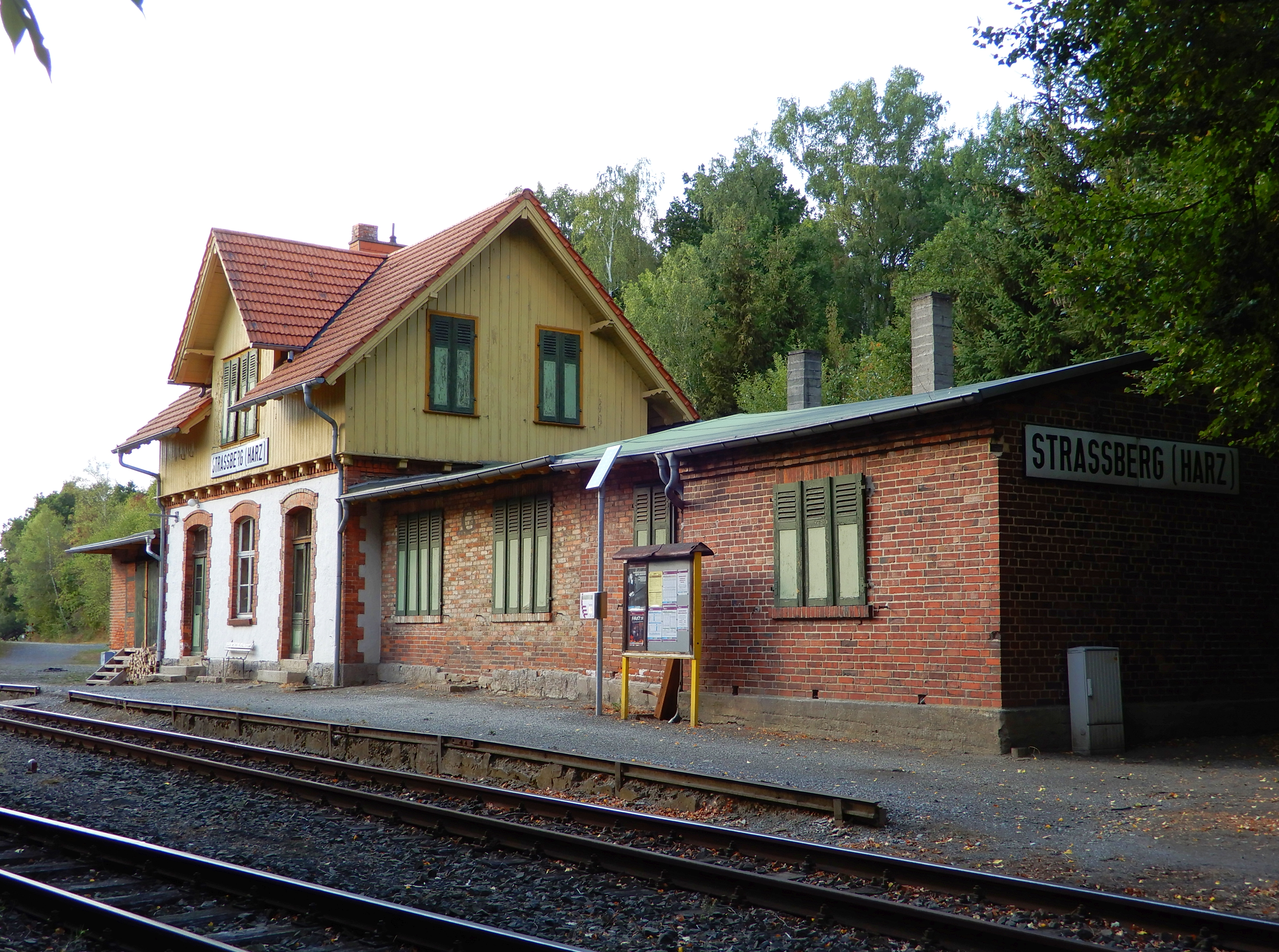 Bahnhof der Selketalbahn in Straßberg.